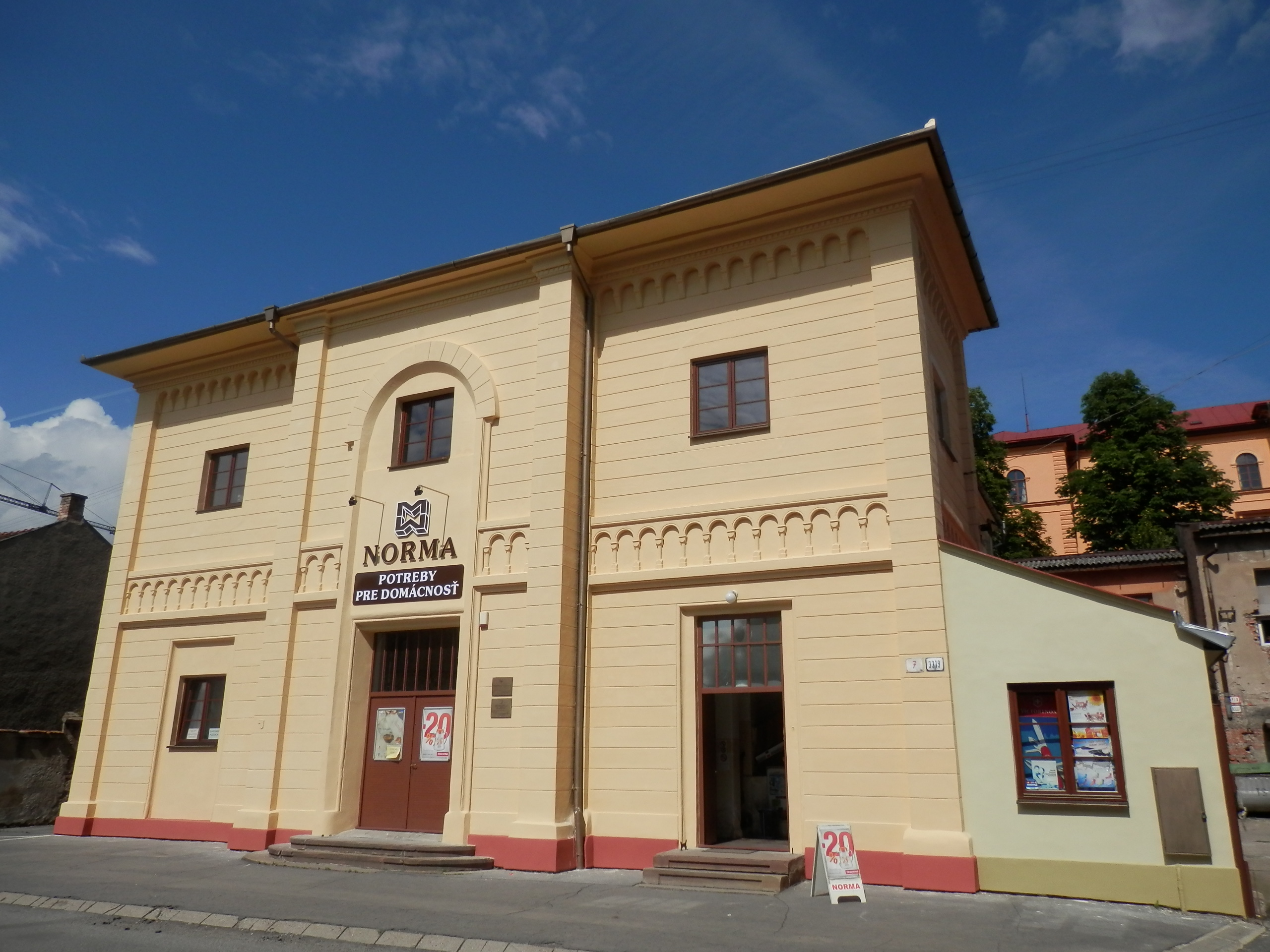 Židovská neologická synagóga. Konštantínova ulica. č.7 Mesto Prešov.